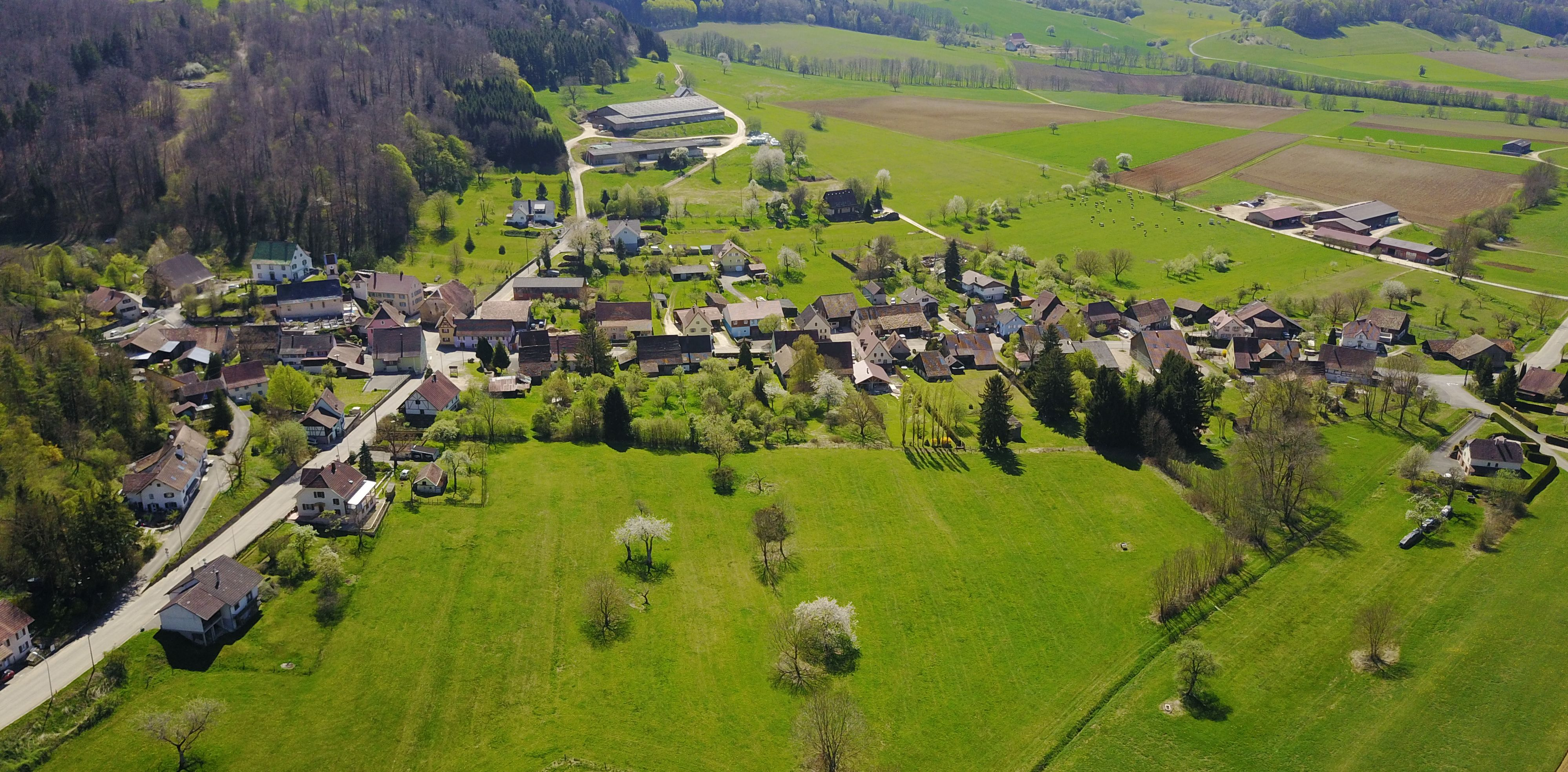 Oberlarg vue du ciel avec un drone